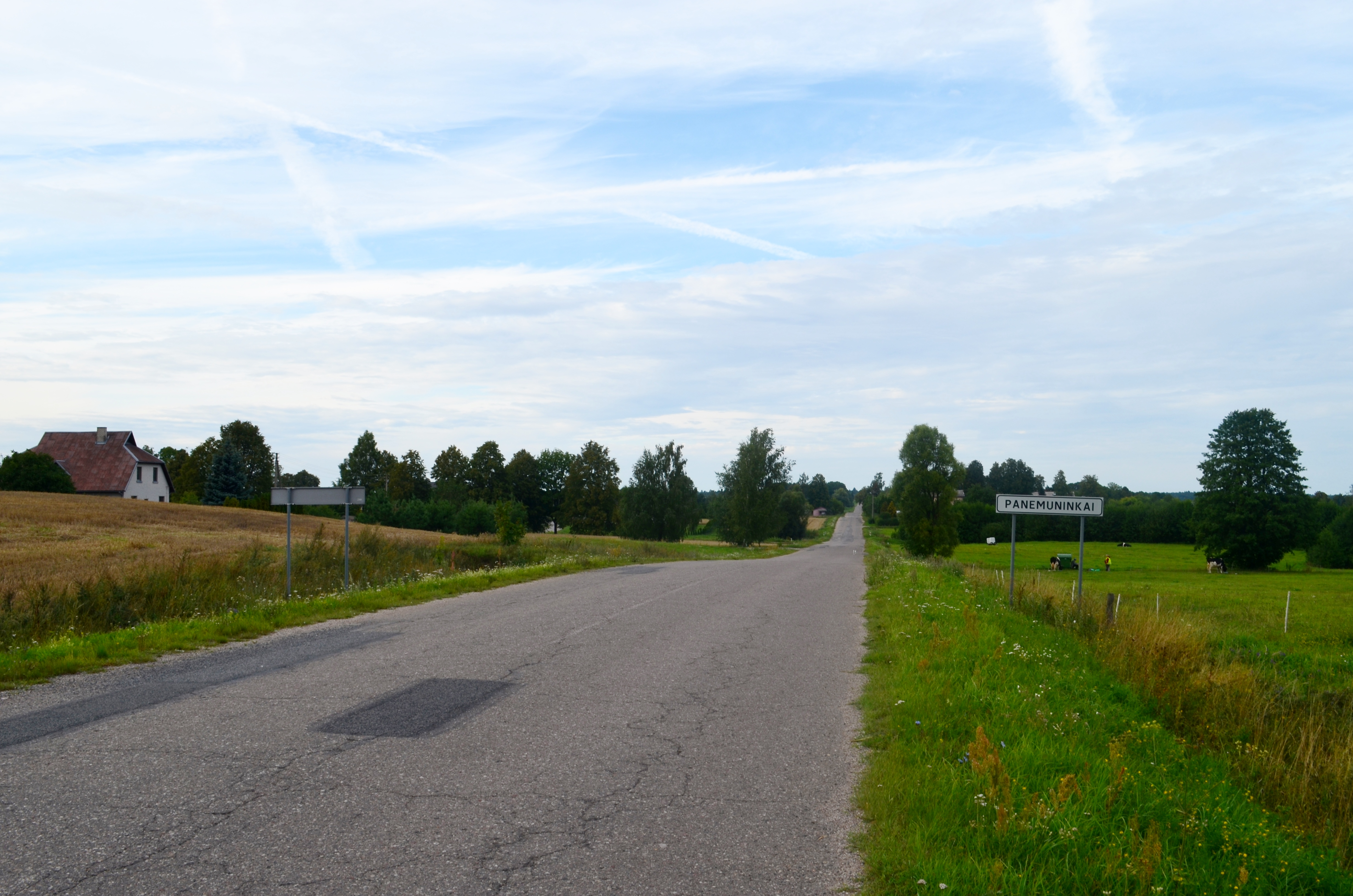 Panemuninkai, Alytaus raj.